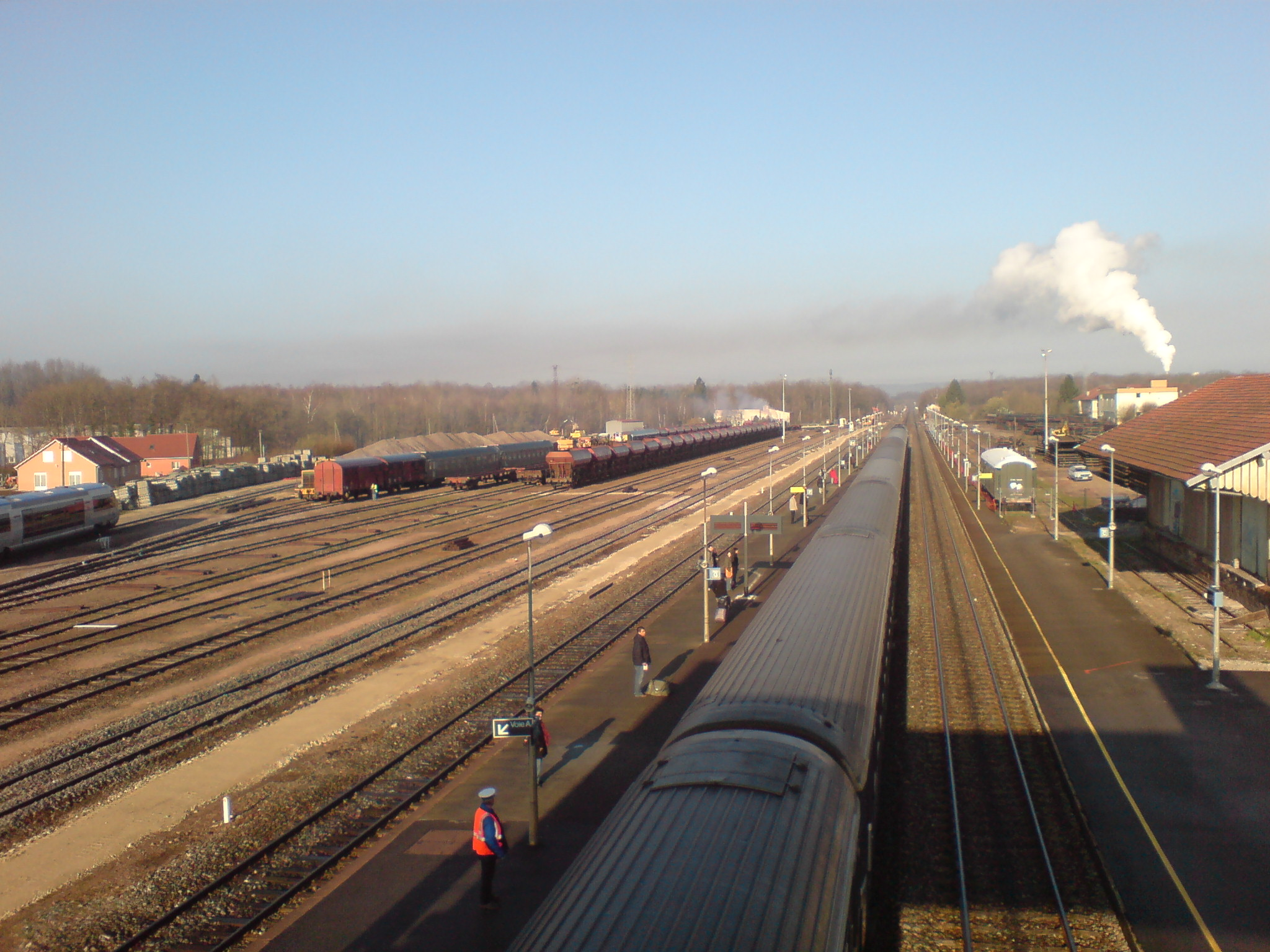 Vue en surplomb de la gare de Lure